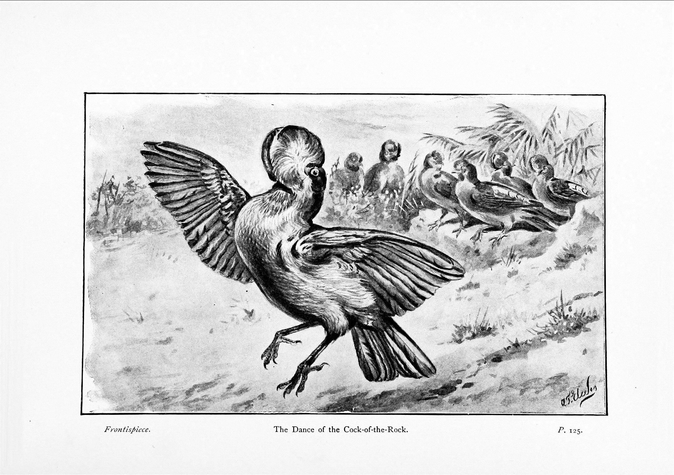 p V H